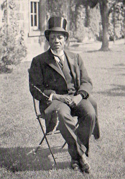 Le roi Léwanika en Europe